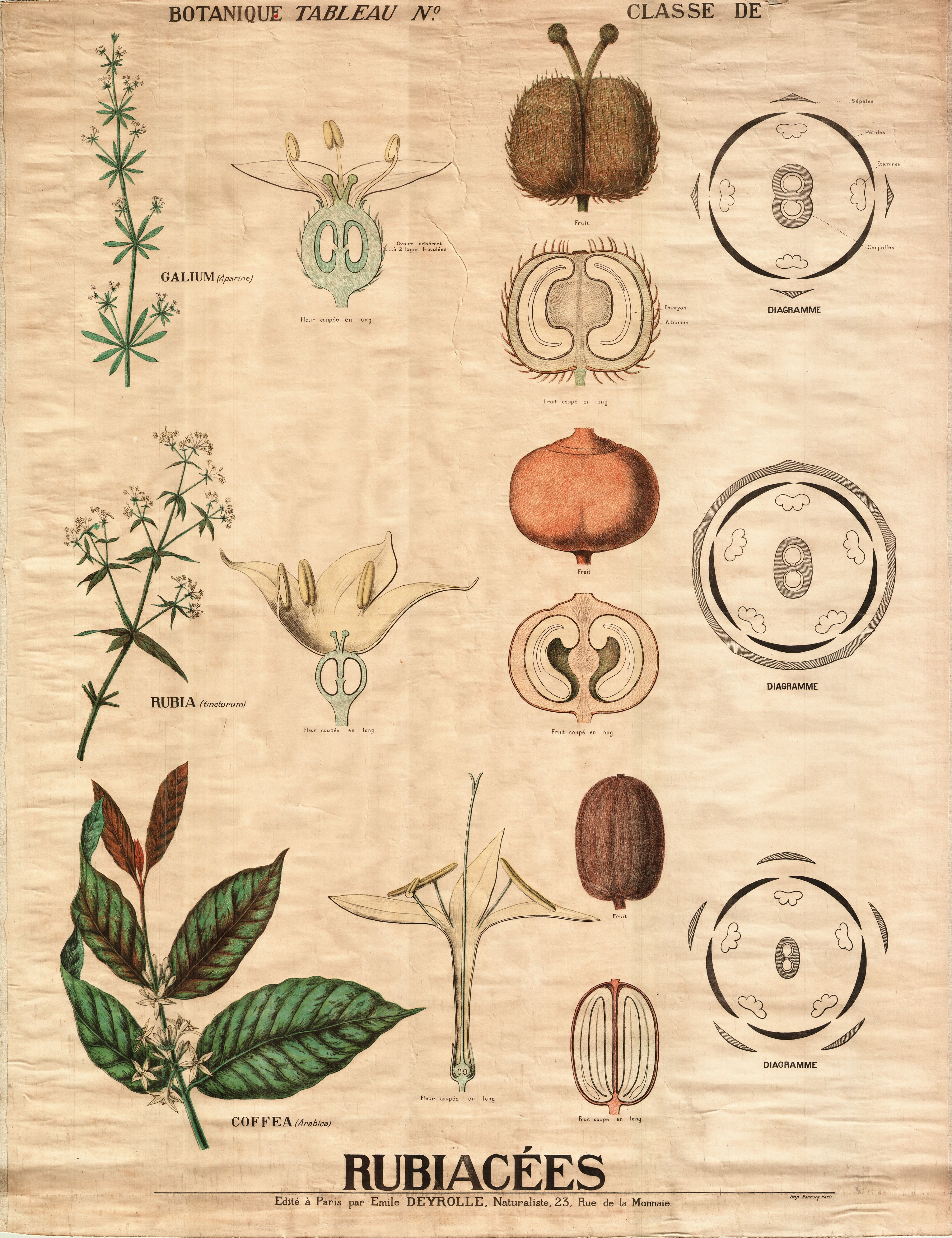 Les rubiacées. Bibliothèque Numérique de l'Université d'Artois. Retrieved on 25 March 2016.